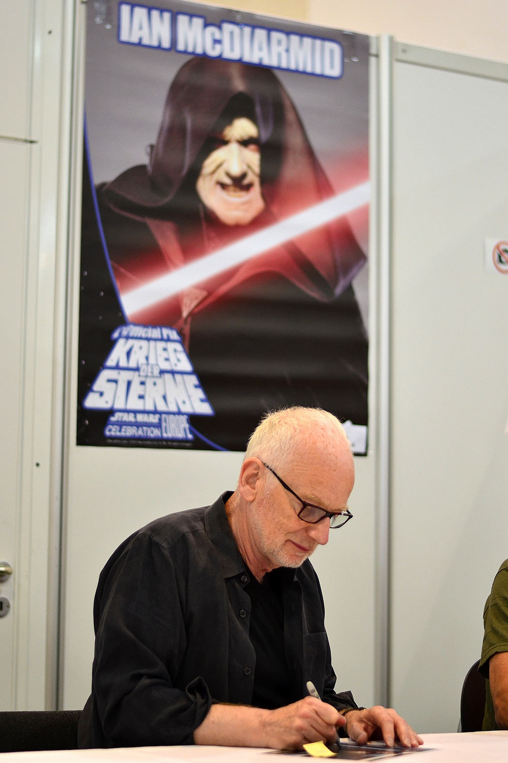 Star Wars Celebration Europe II, Essen, Deutschland